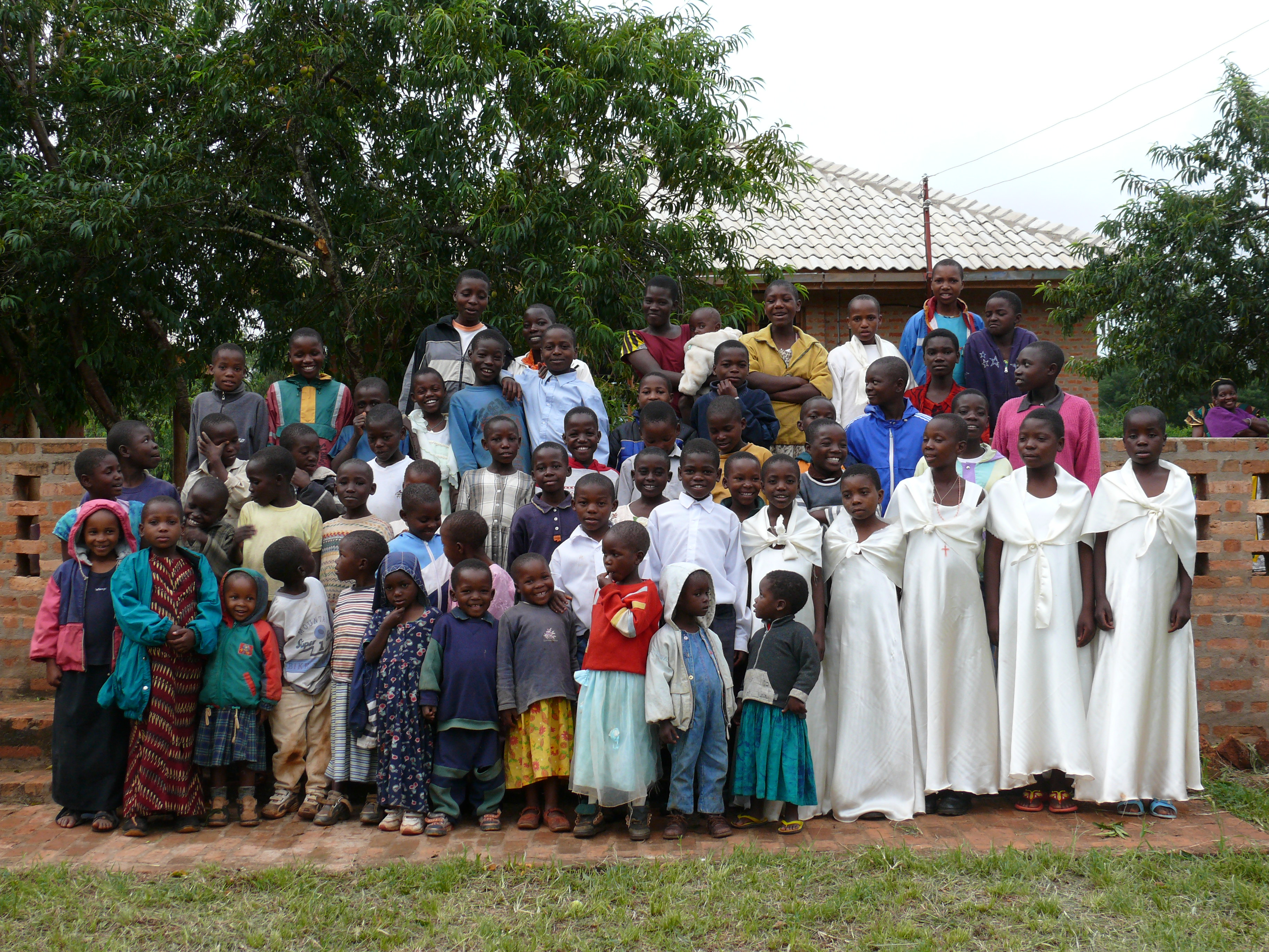 Gruppenfoto der Kinder aus dem Amani-Kinderdorf aus dem Jahre 2008.